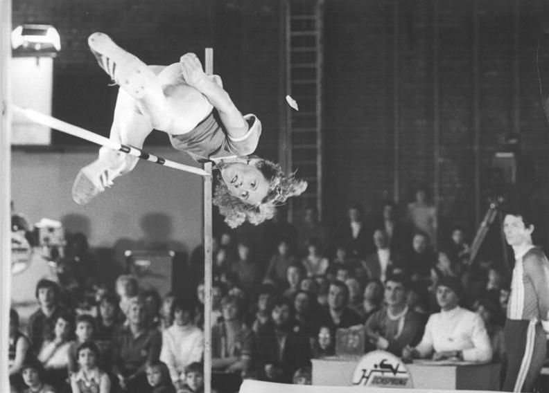 Rosemarie Ackermann ADN-ZB Ludwig-30.12.79 Erfurt: Hochsprung mit Musik war das Motto einer sportlichen Veranstaltung zum Jahresausklang der POS Karl Marx in Arnstadt. Der Einladung waren Spitzensportler, unter ihnen Rosemarie Ackermann vom SC Cottbus, und hoffnungsvolle Nachwuchssportler gefolgt.